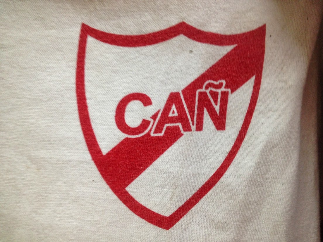 Logo del Club Ñuñorco de Monteros Tucumán estampado en tela.